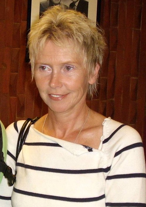 Ewa Błaszczyk (ur. 15 października 1955 w Warszawie) - polska aktorka teatralna i filmowa, piosenkarka